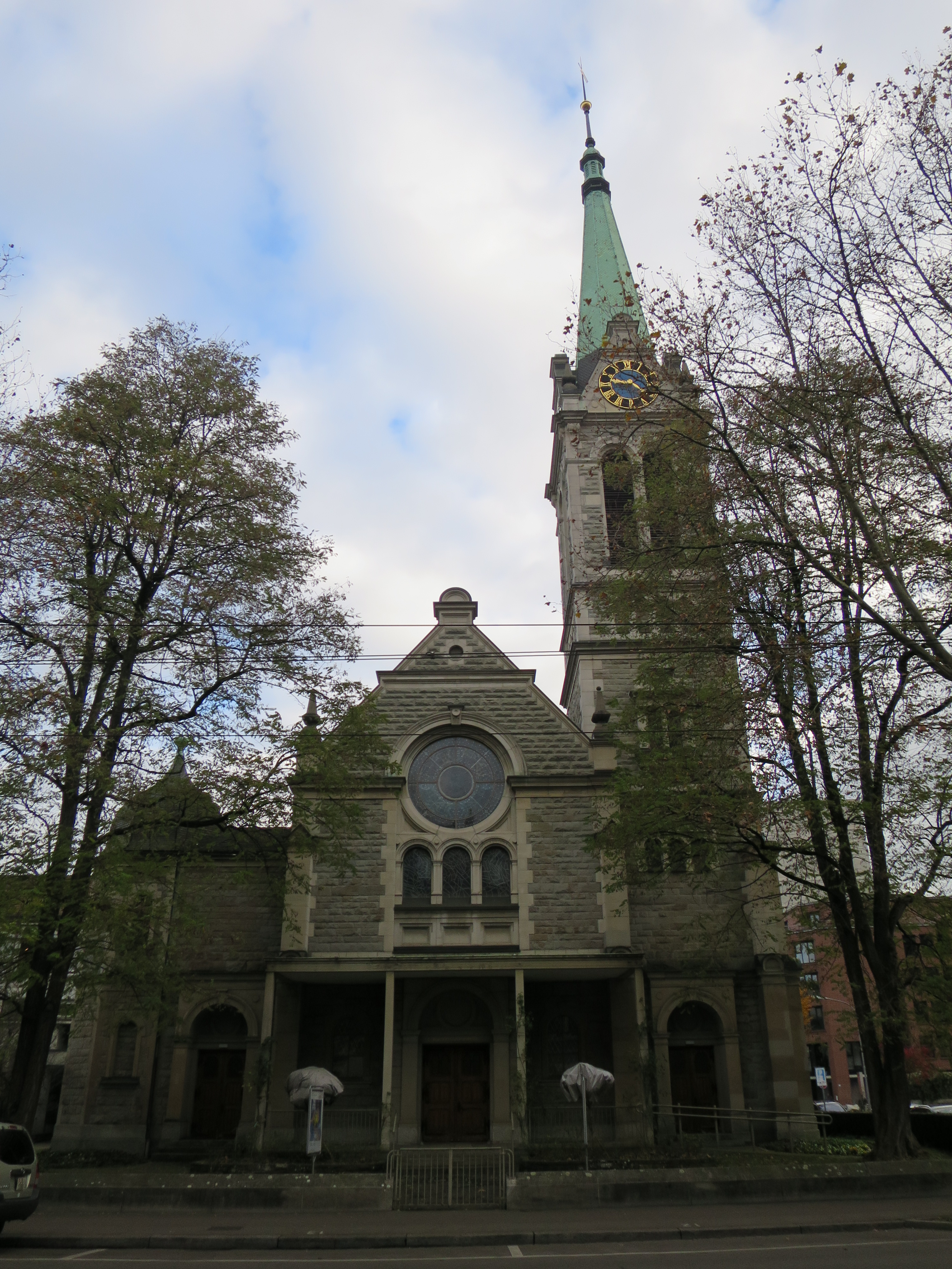 Reformierte Johanneskirche Zürich-Industriequartier: Ansicht von Süden